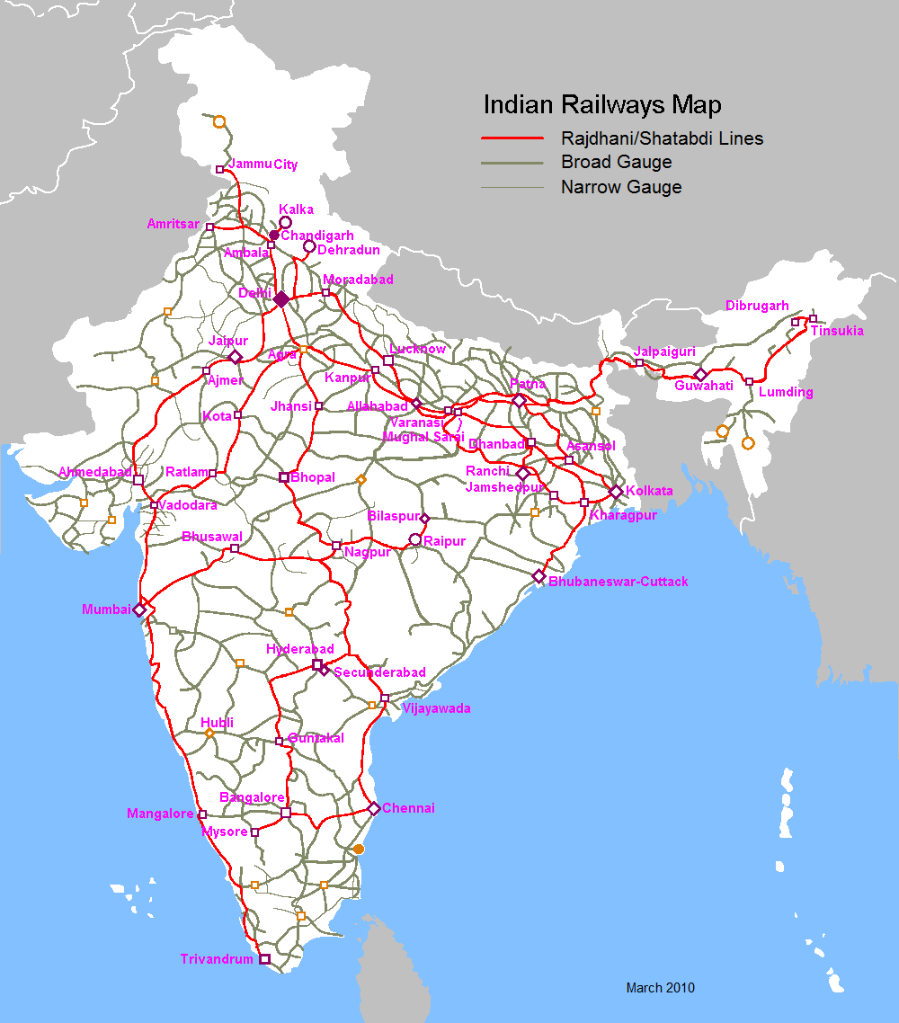 Indian Railways Rajdhani Shatabdi Lines